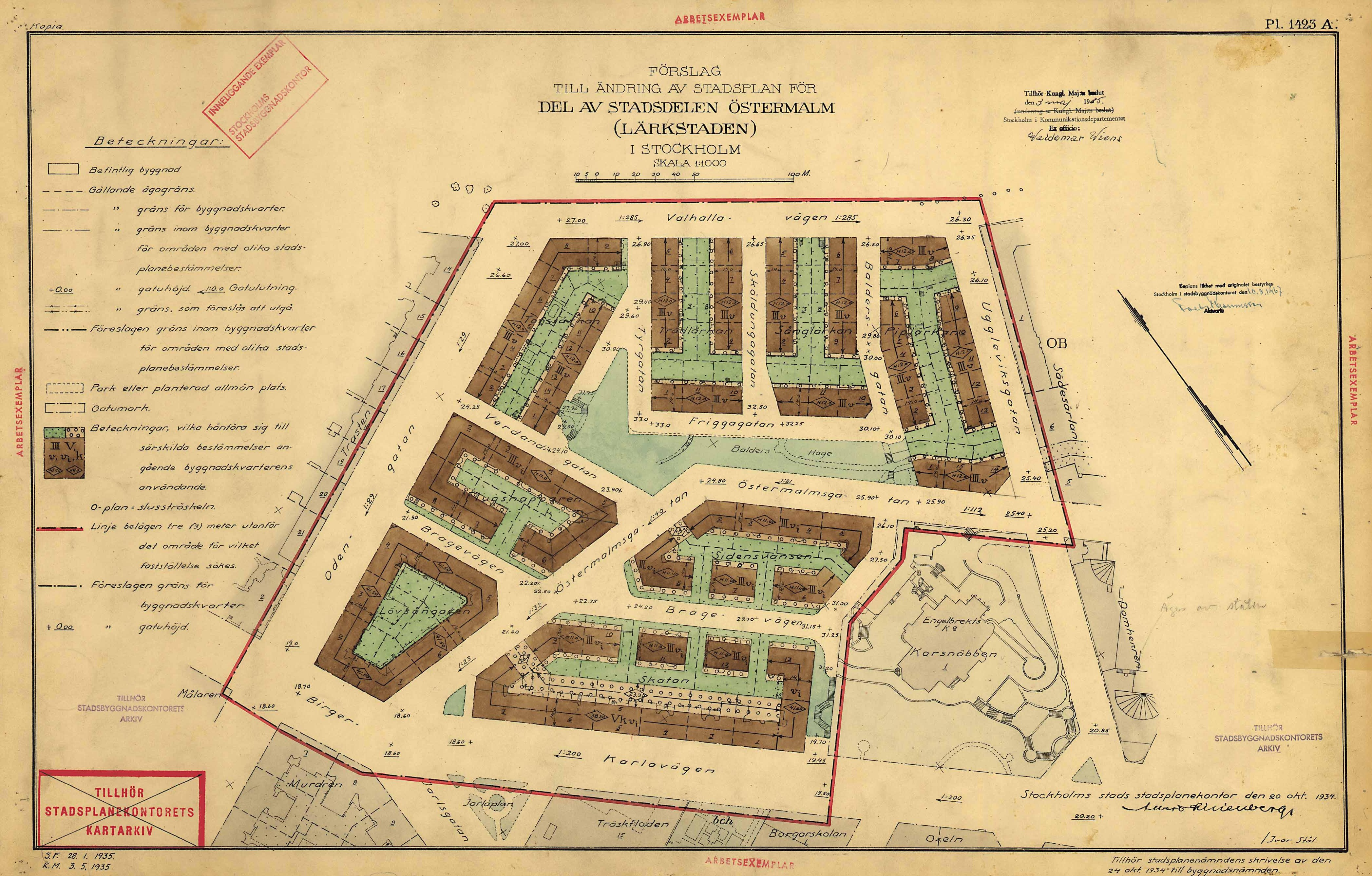 Stadsplan för Lärkstaden på Östermalm i Stockholm